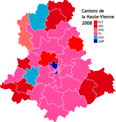 Carte des cantons de la Haute-Vienne après les élections cantonales de 2008